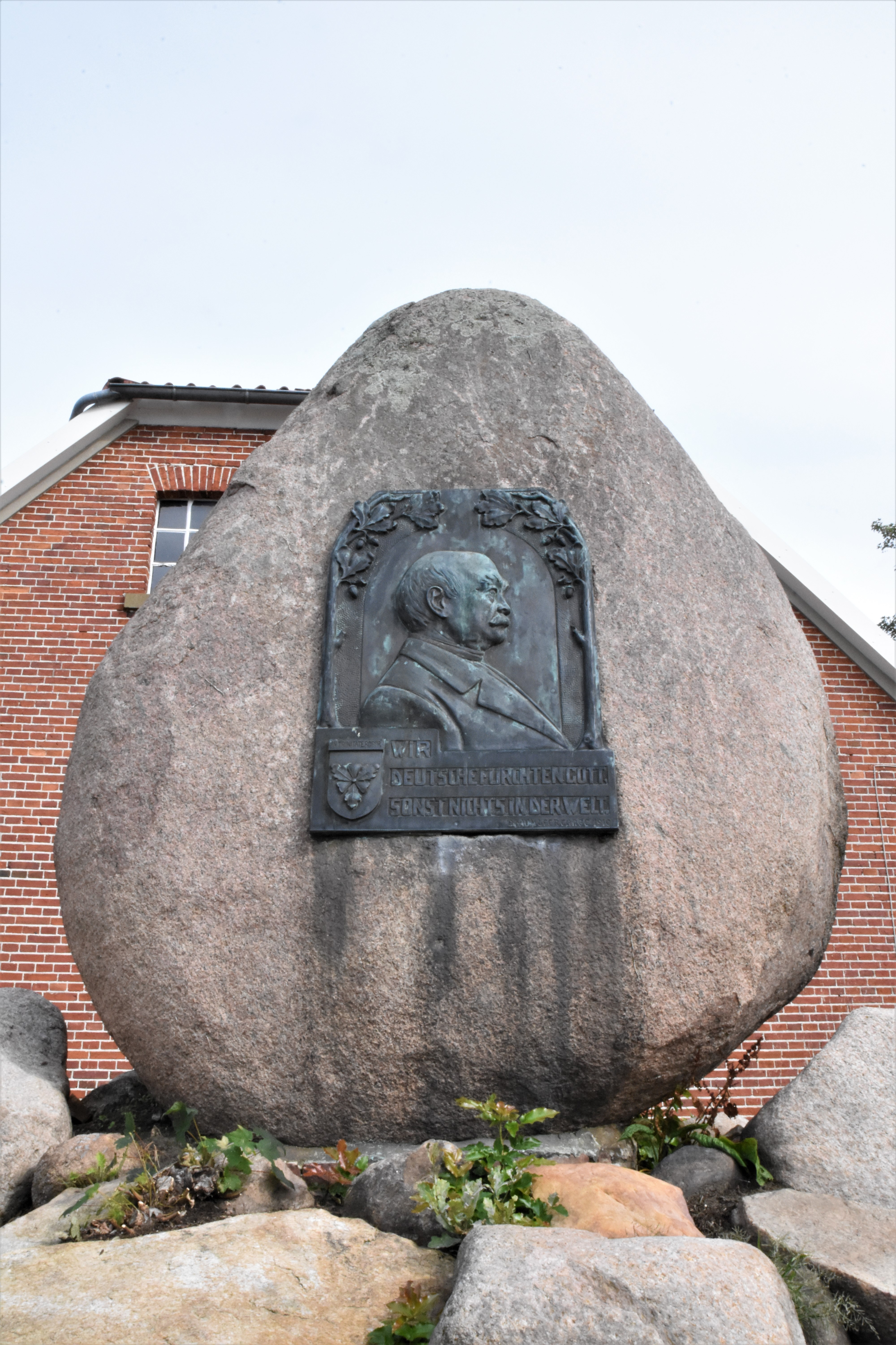 Das Bismarckdenkmal in Badbergen